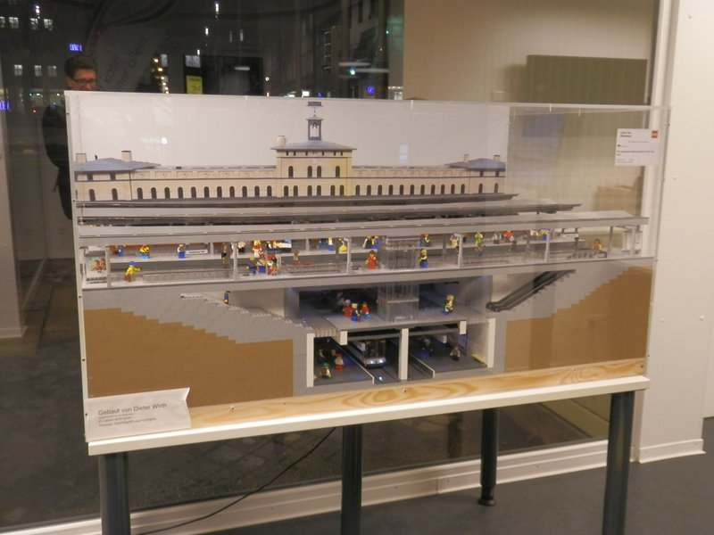 Modell des künftigen Bahnhofstunnels der Augsburger Straßenbahn, gebaut aus Lego-Bausteinen, in der Augsburg-City-Infobox